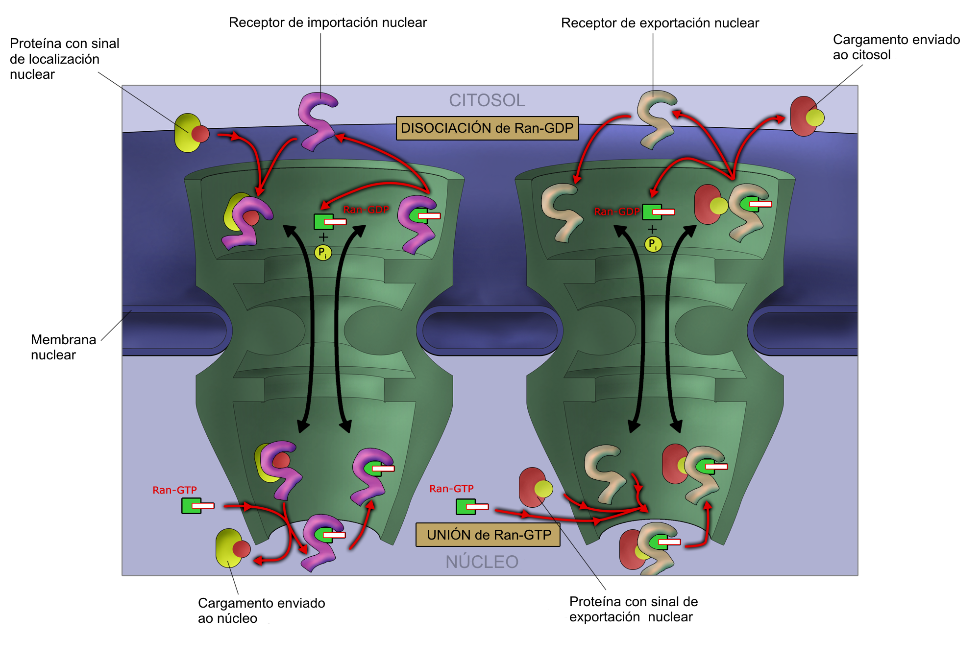 Ran cycle